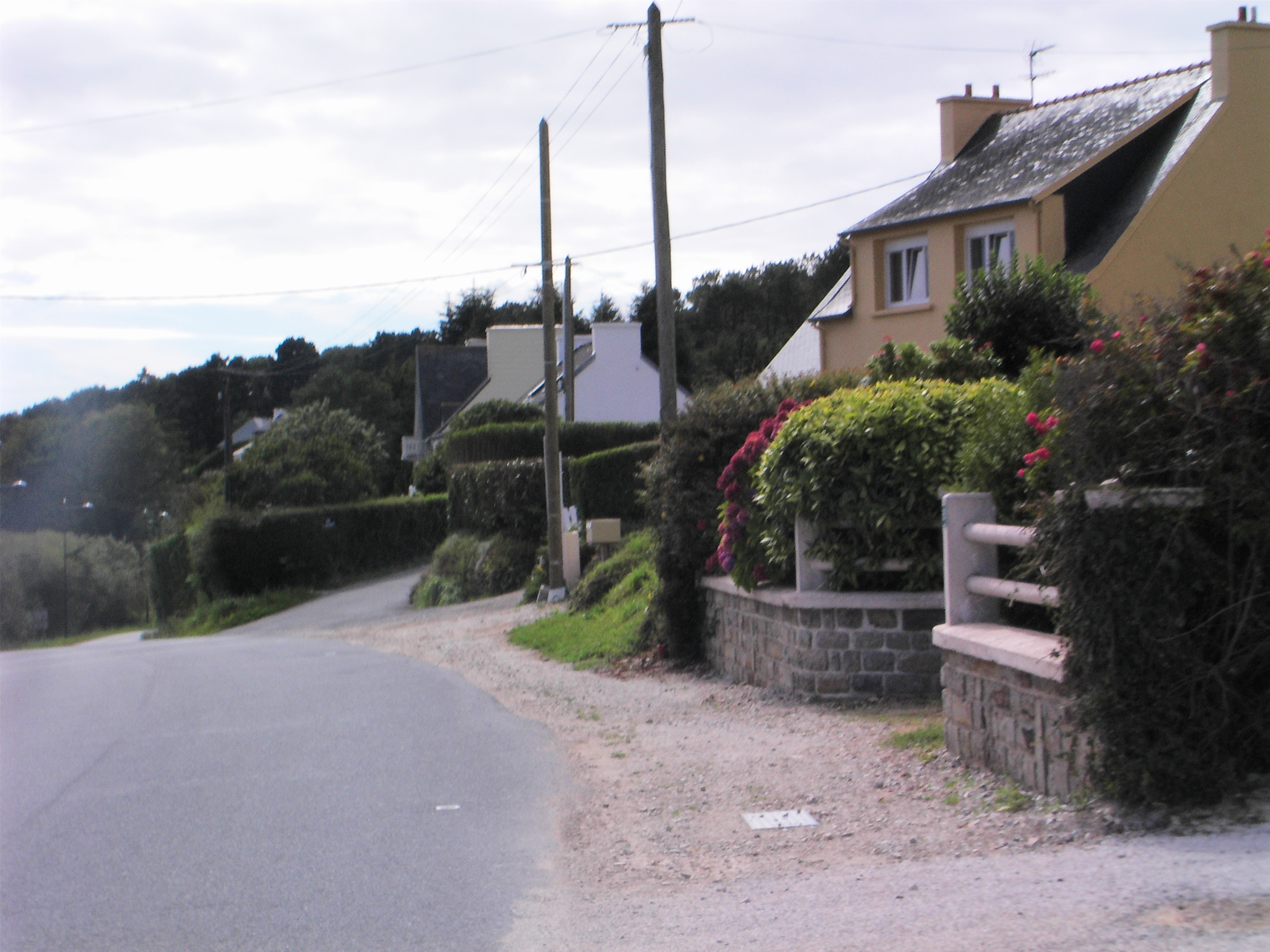 Telgruc-sur-Mer le 17 août 2007, France.